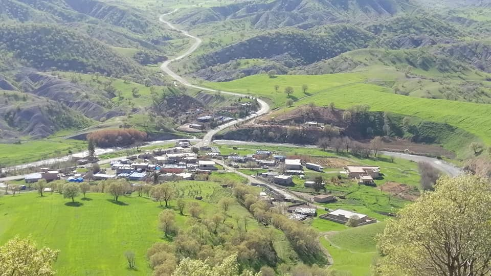 کوردی: گوندی پشتە